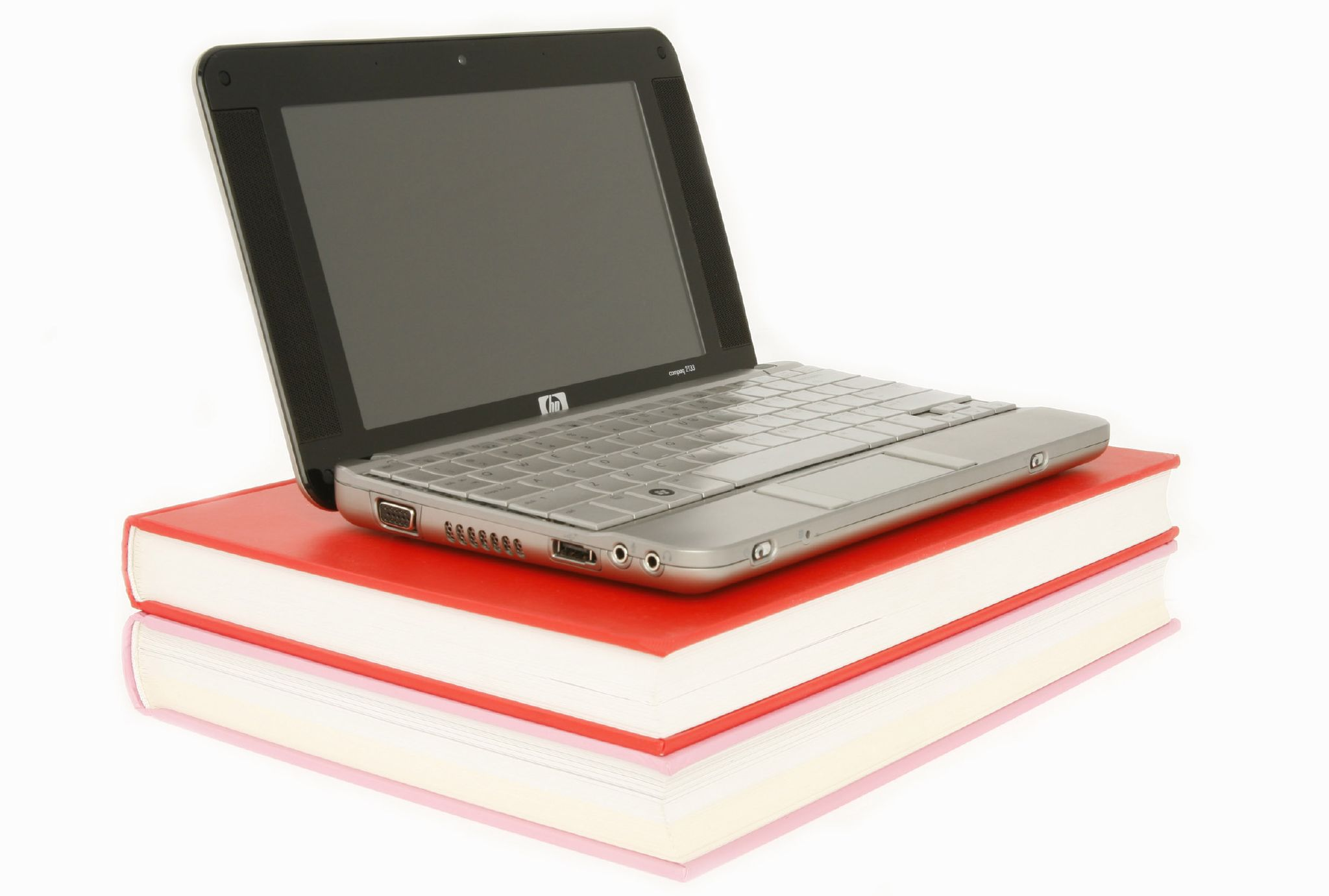 HP 2133 Mini-Note PC (side)